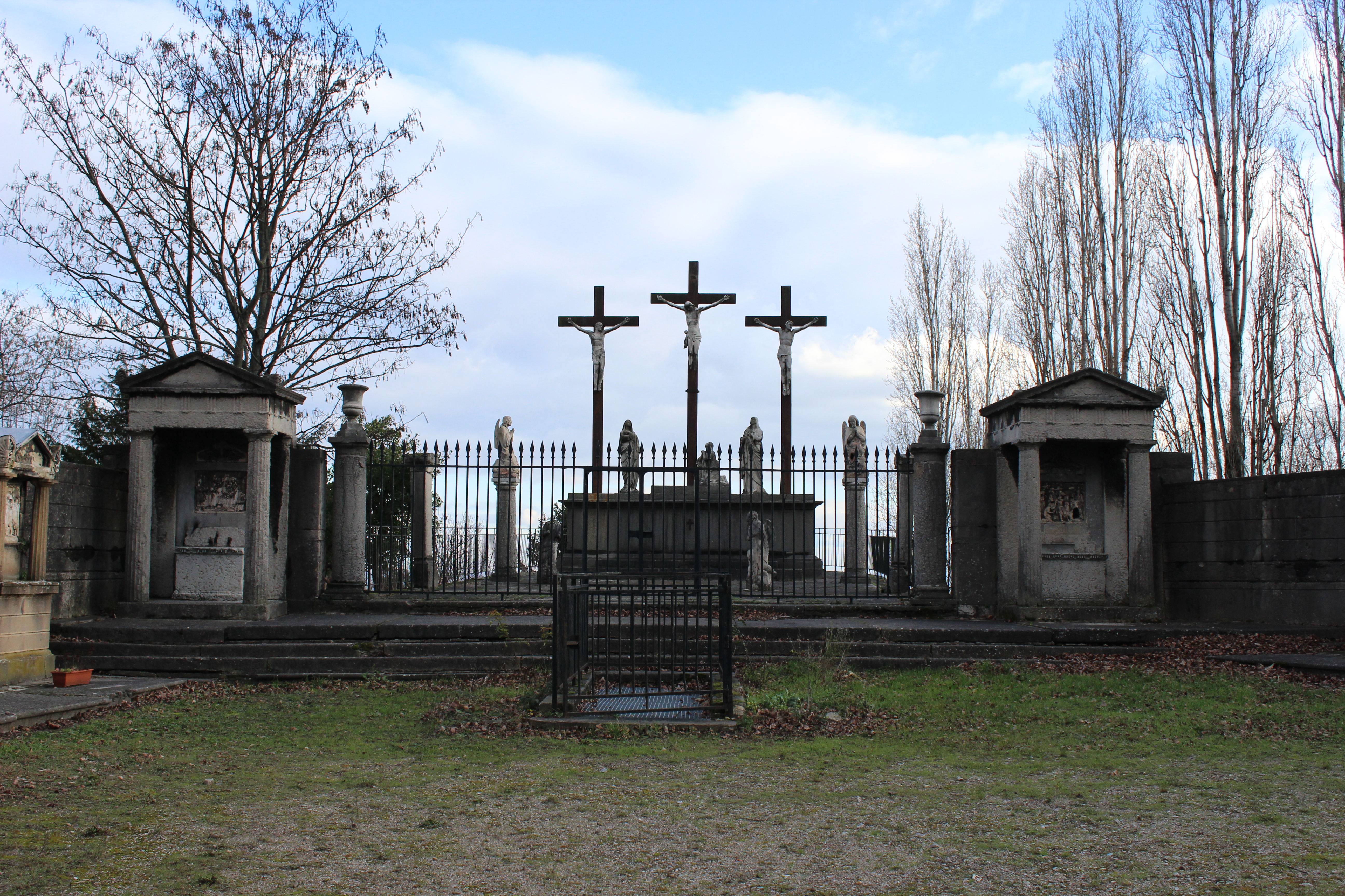 Calvaire de l'église Saint-Irénée à Lyon.